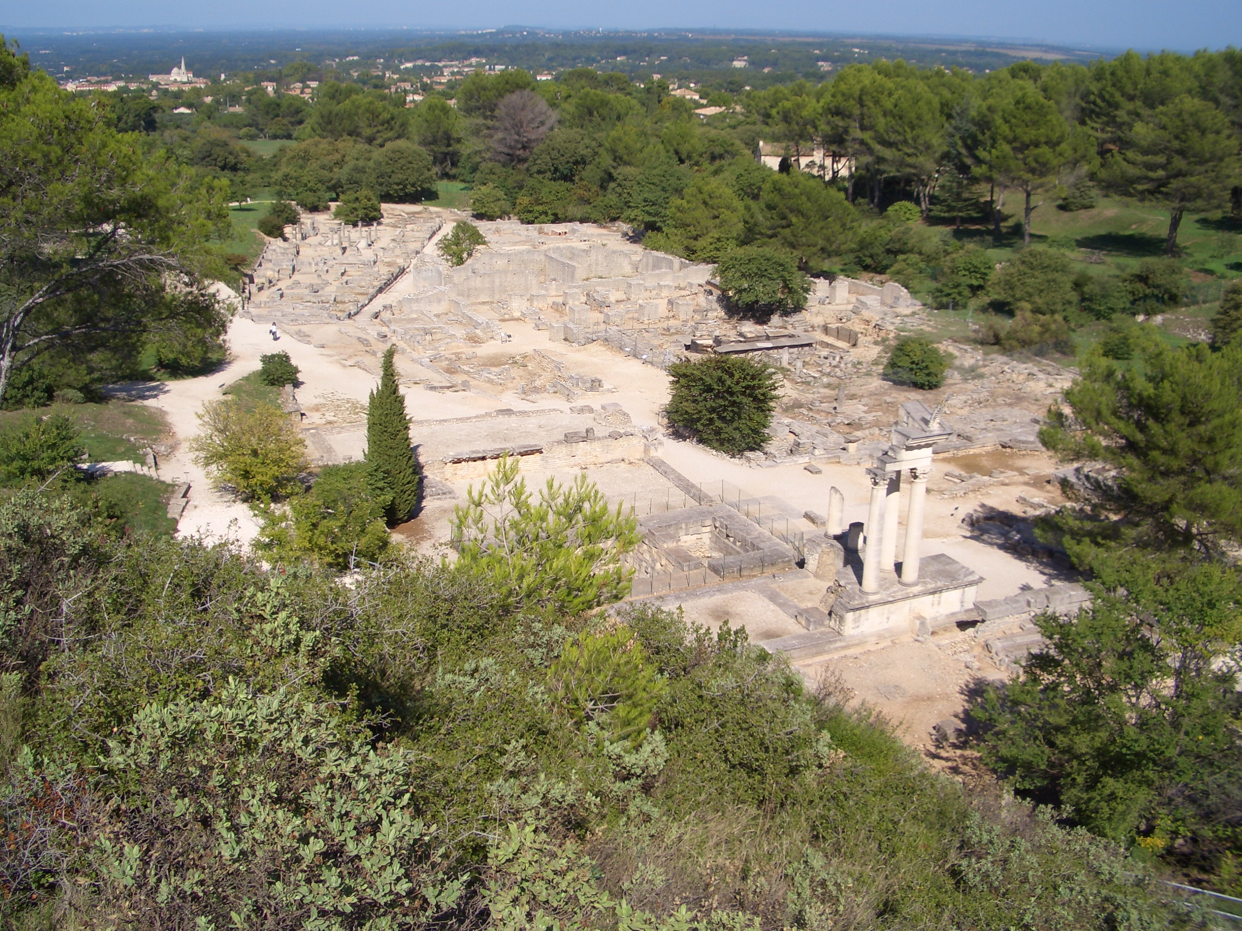 Glanum